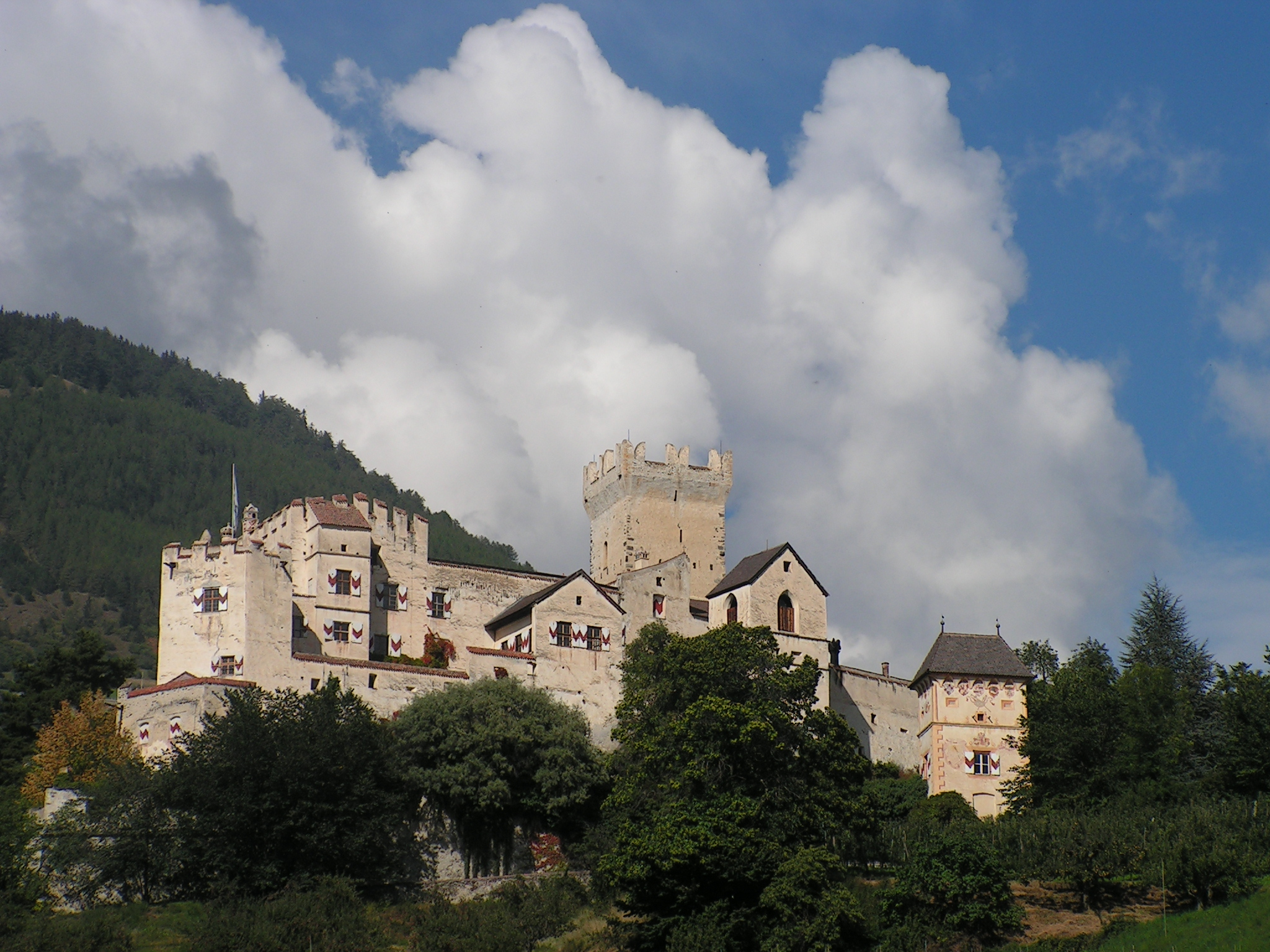 Castel Coira (Churburg) in Sluderno (Schluderns)